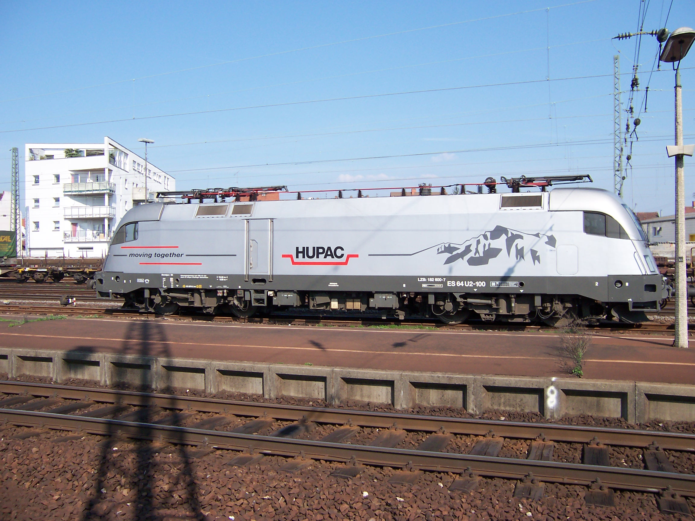 Hupac ES 64 U 2 - 100